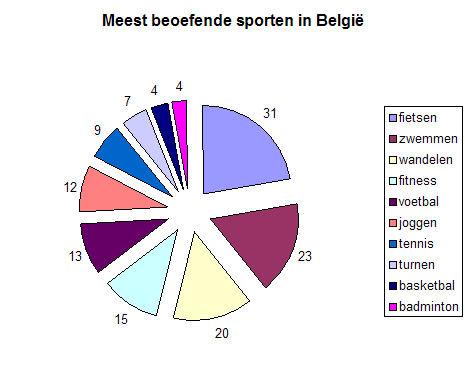 zelf, excel + paint bron cijfers: BOIC + NIS bronvermelding naar bron nodig